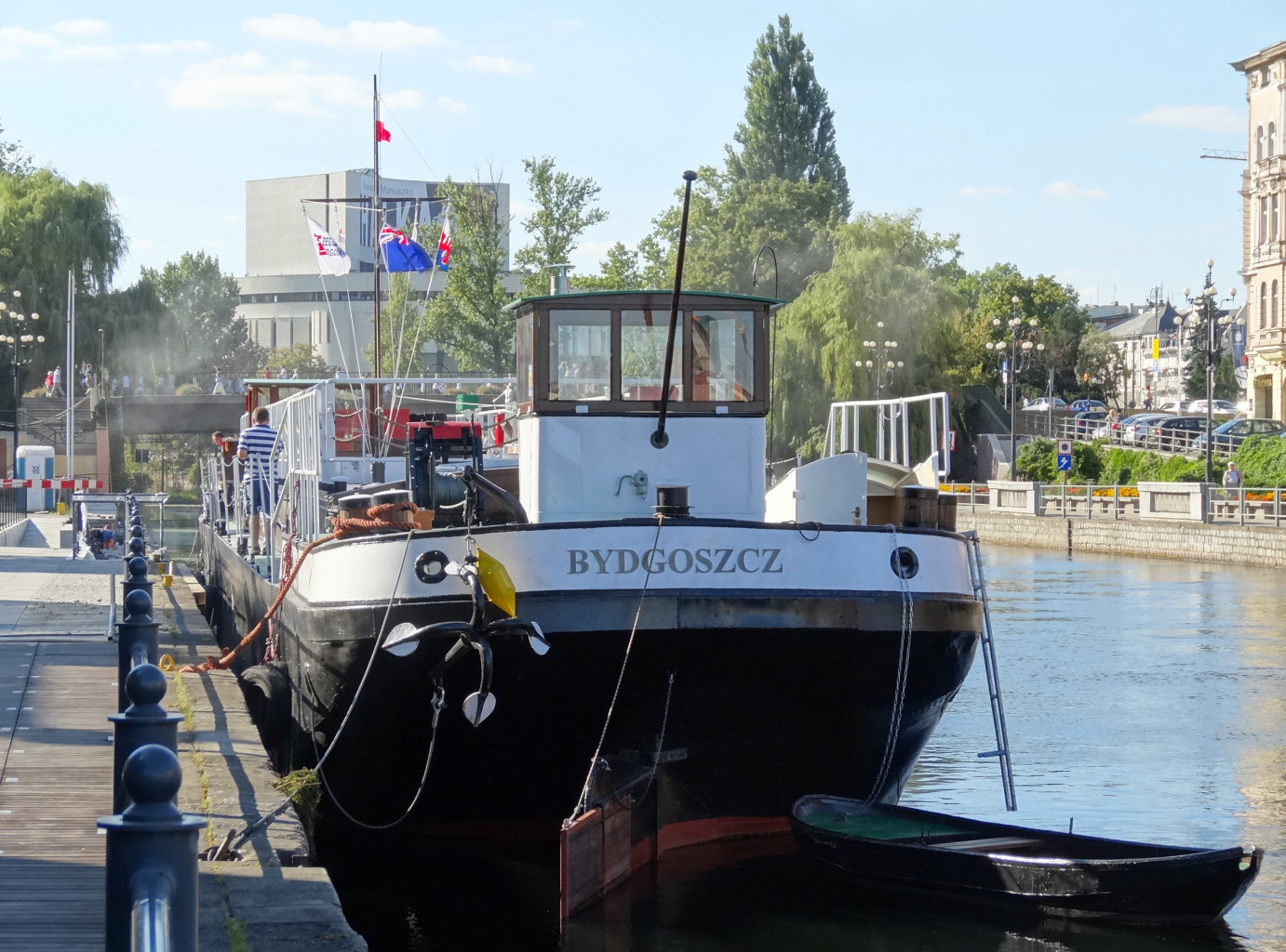 Nabrzeże Brdy w centrum Bydgoszczy. Barka Lemara przeznaczona na muzeum